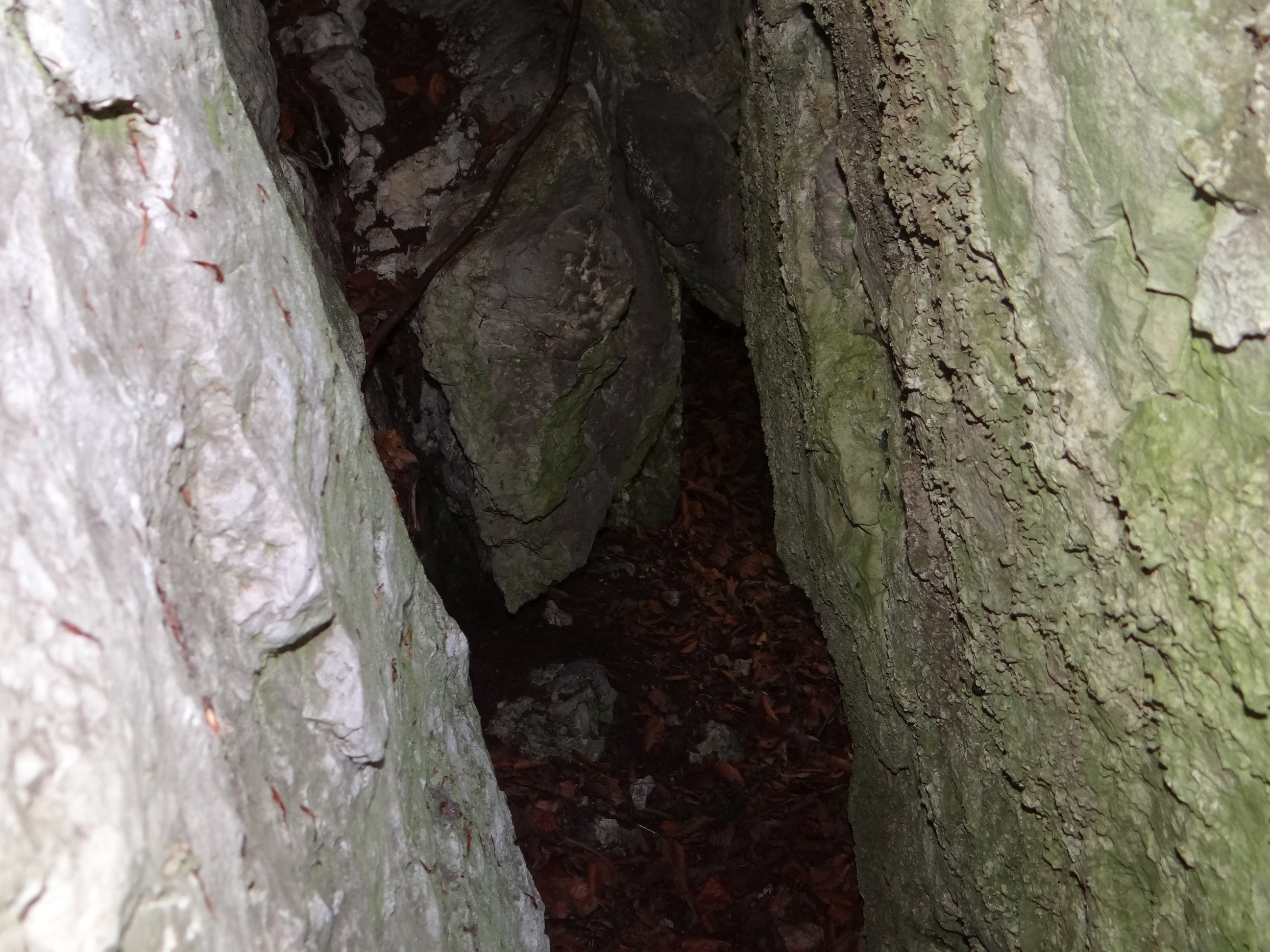 Szczelina w Krętych Skałach II w Dolinie Szklarki